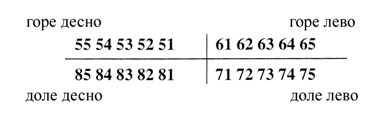 Obeležavanje mlečnih zuba po FDI sistemu, ustanovljenom u Bukureštu 1970. godine.